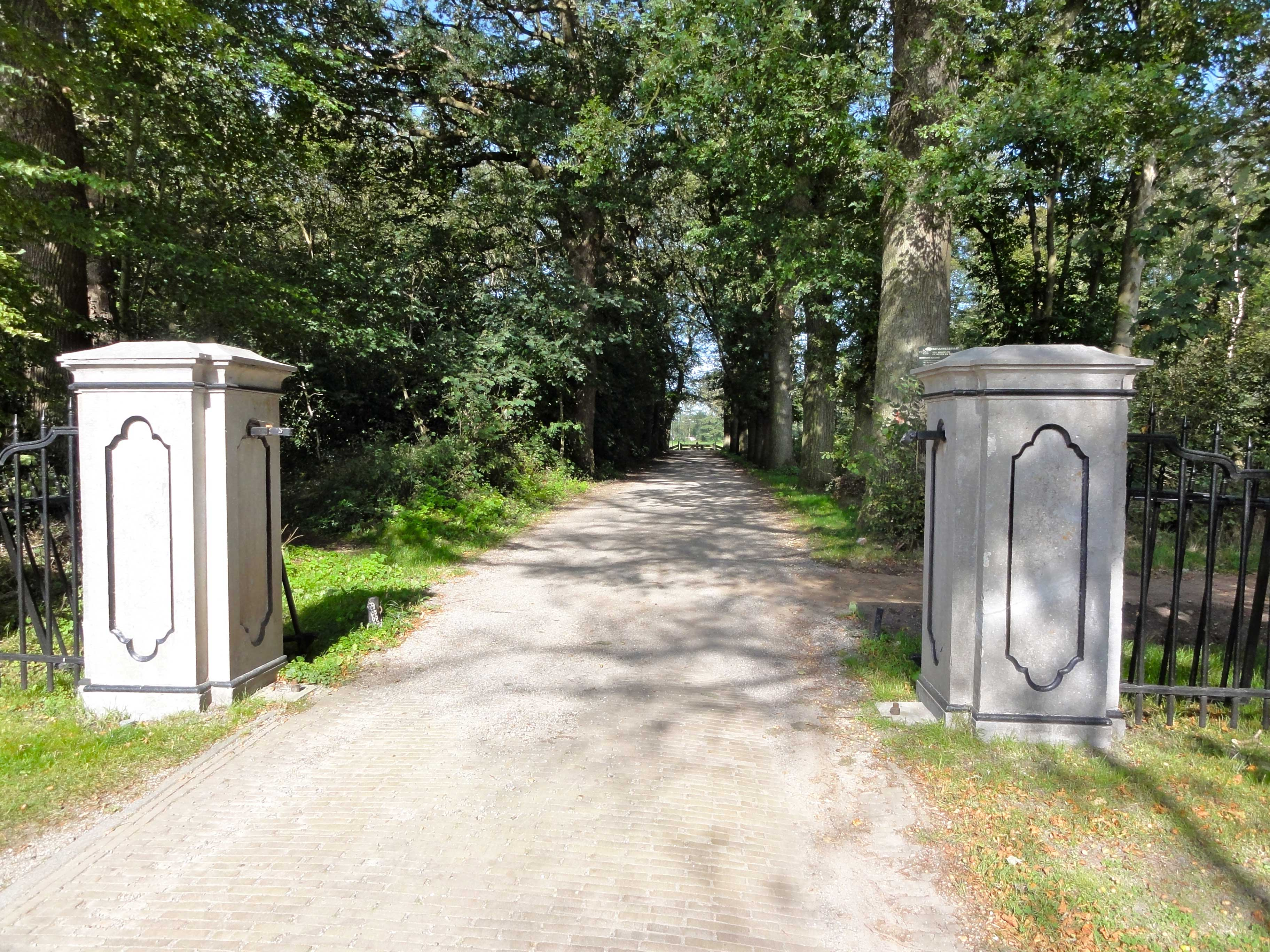 Toegang voormalige buitenplaats Meerenstein, thans Van Coehoornbos, te Wijckel